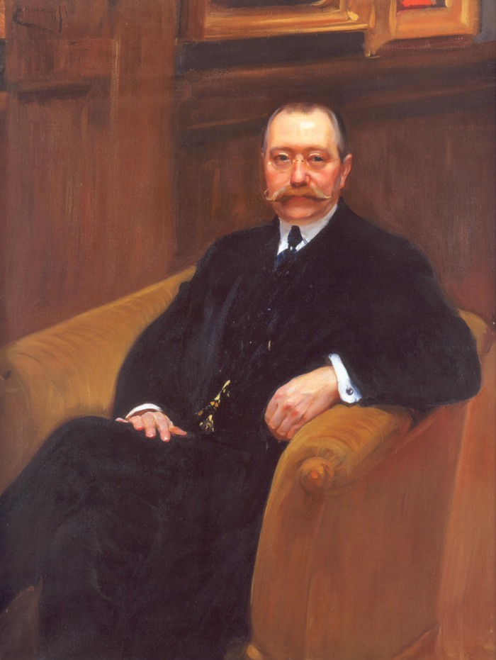 Портрет архитектора Георгия Шлейфера. 1911